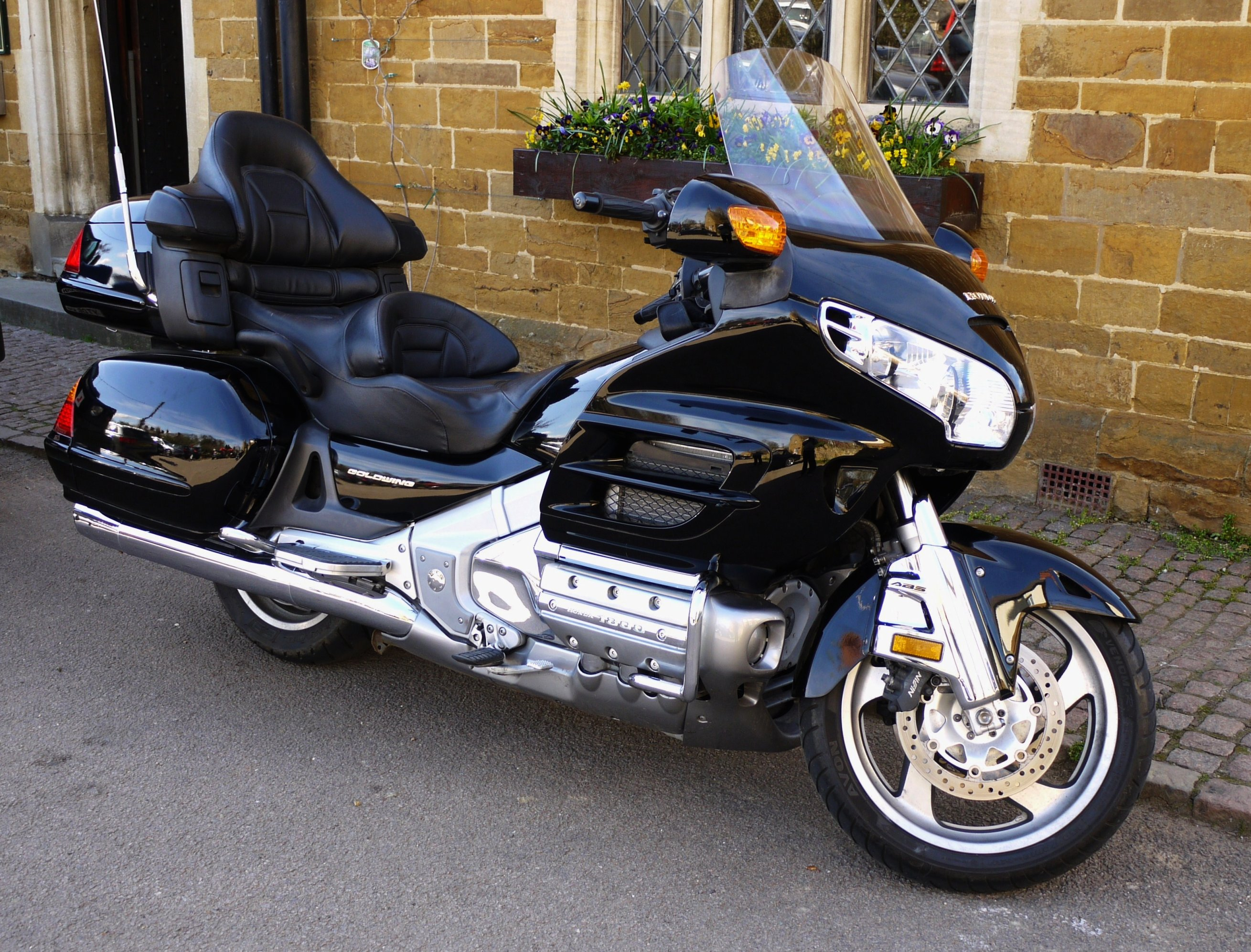 Panasonic G1 14-45 Lens